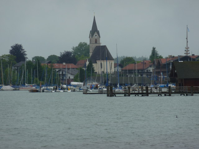 Blick nach Seebruck mit St. Thomas und Stephan